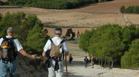 El Camino del Cid se puede recorrer por sendero